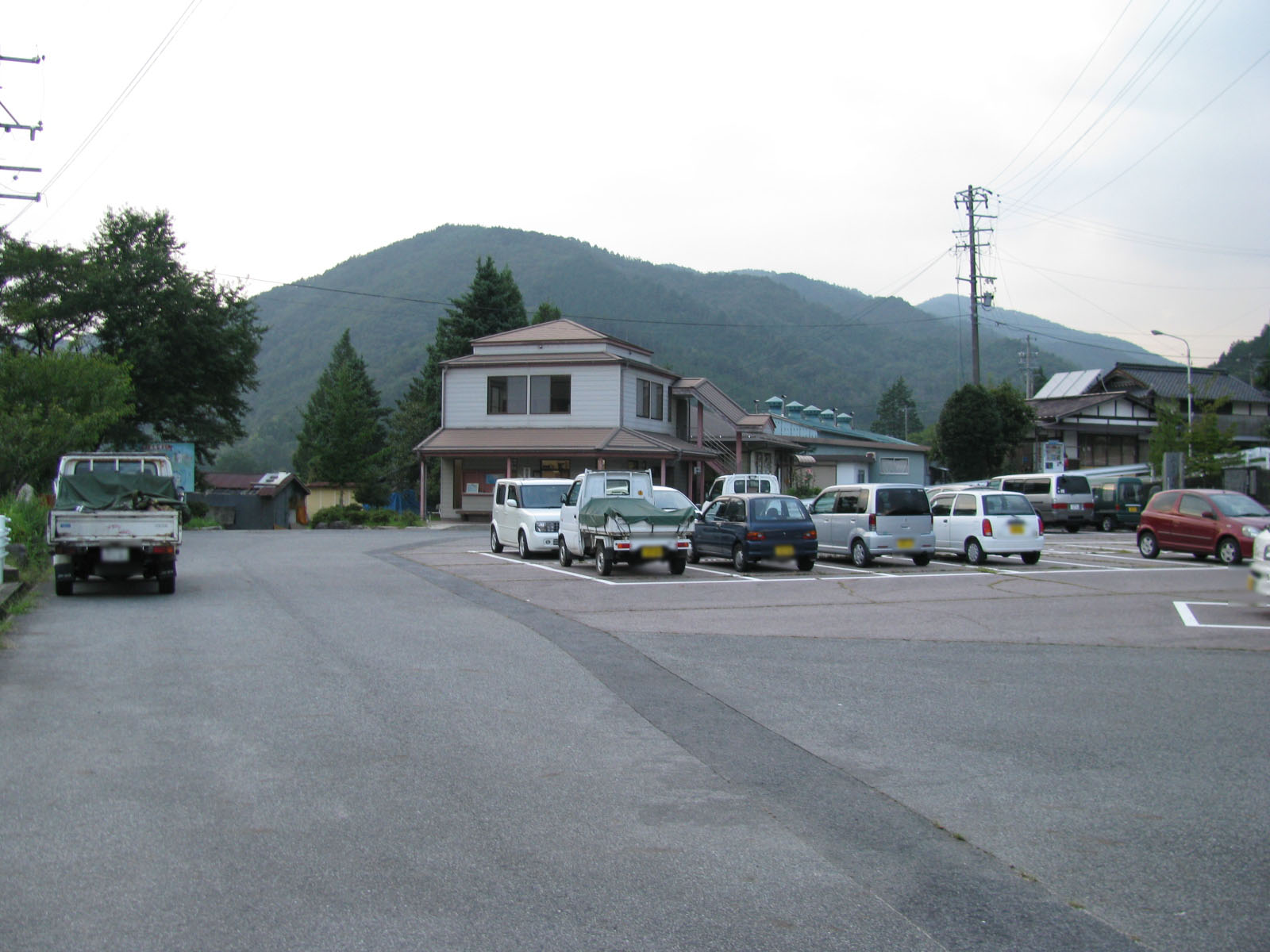 JR中央本線田立駅